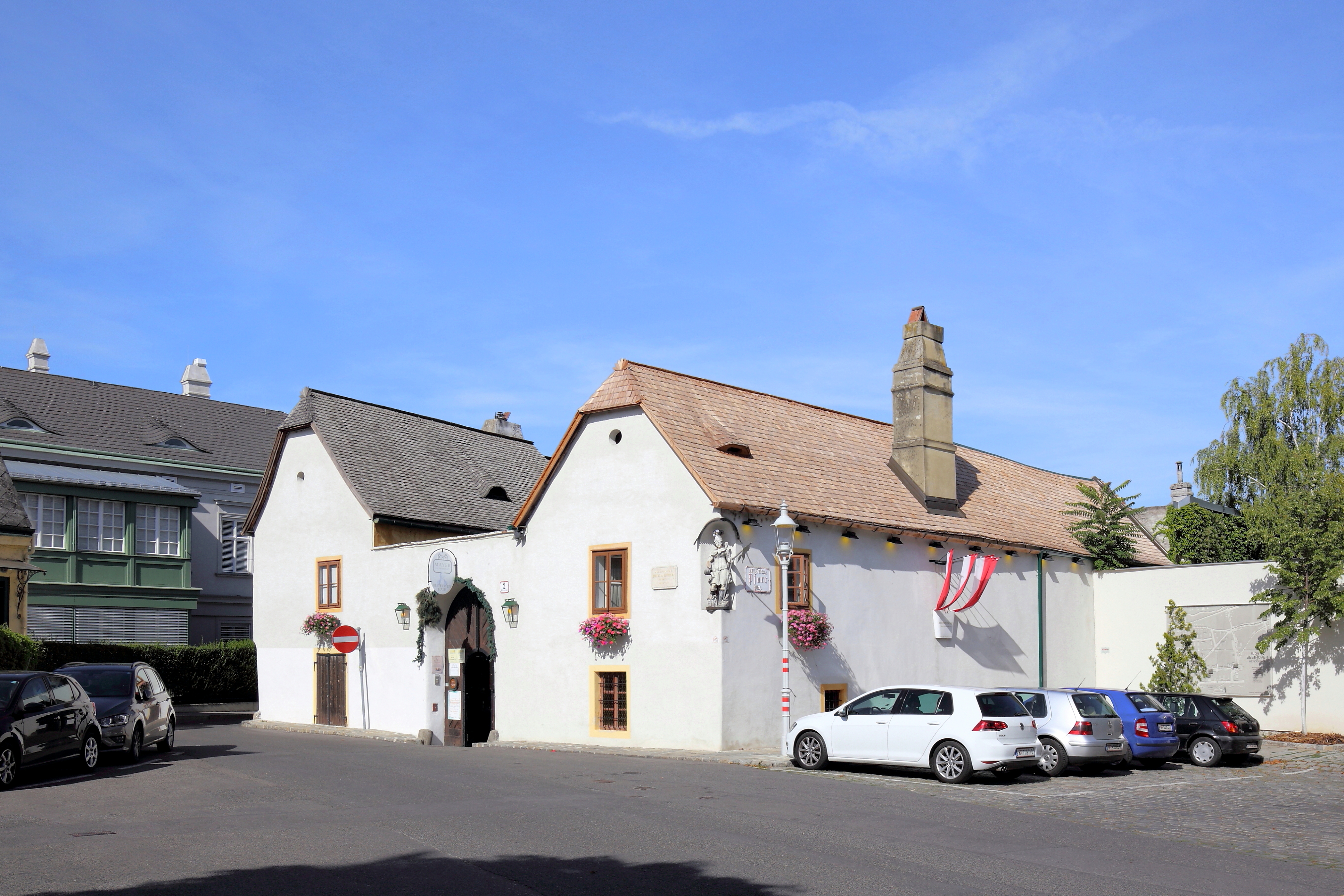 Das Beethoven-Wohnhaus ("Heuriger Mayr") am Pfarrplatz 2 in Heiligenstadt, ein Ortsteil des 19. Wiener Gemeindebezirkes Döbling.Das Winzerhaus besitzt einen Kern aus dem 17. Jahrhundert. Im Sommer 1817 wohnte unter anderem Ludwig van Beethoven darin.